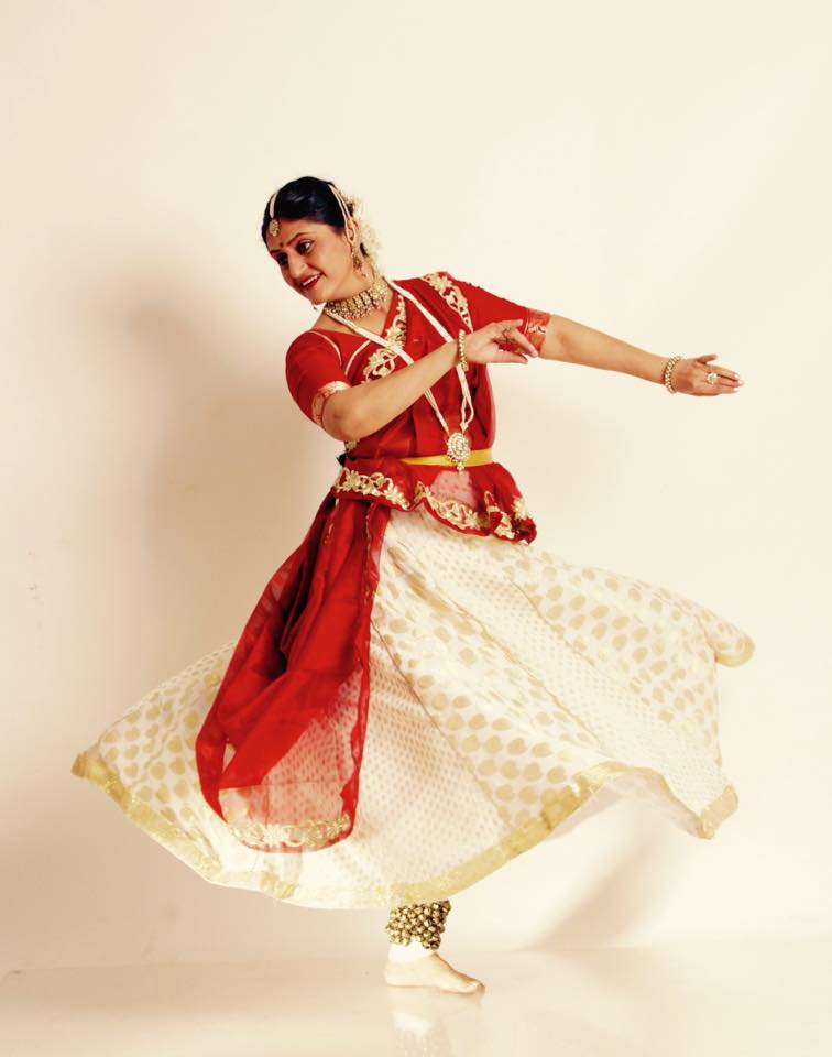 Sesión fotográfica 2015